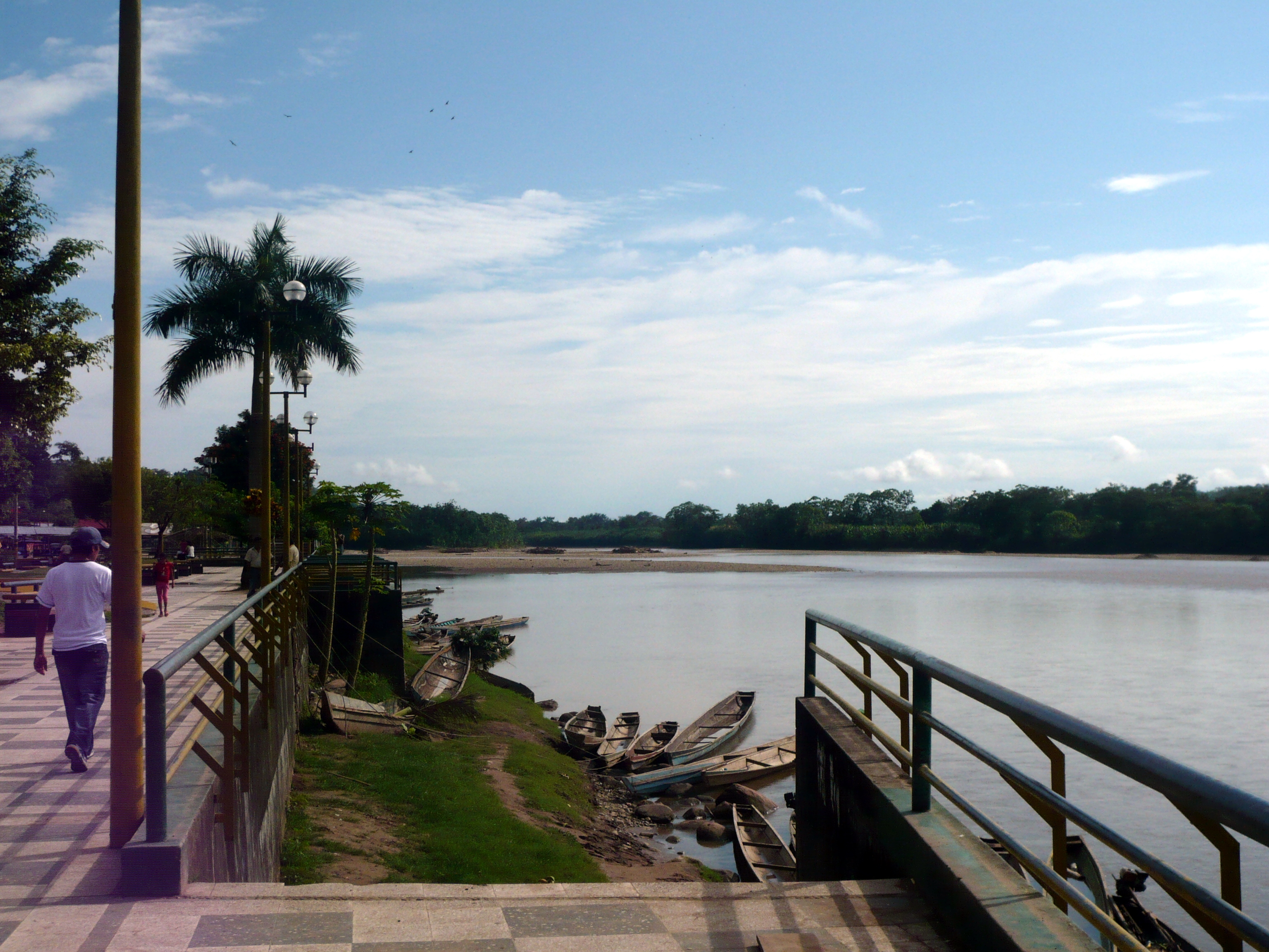 El río Aguaytía en la ciudad del mismo nombre.